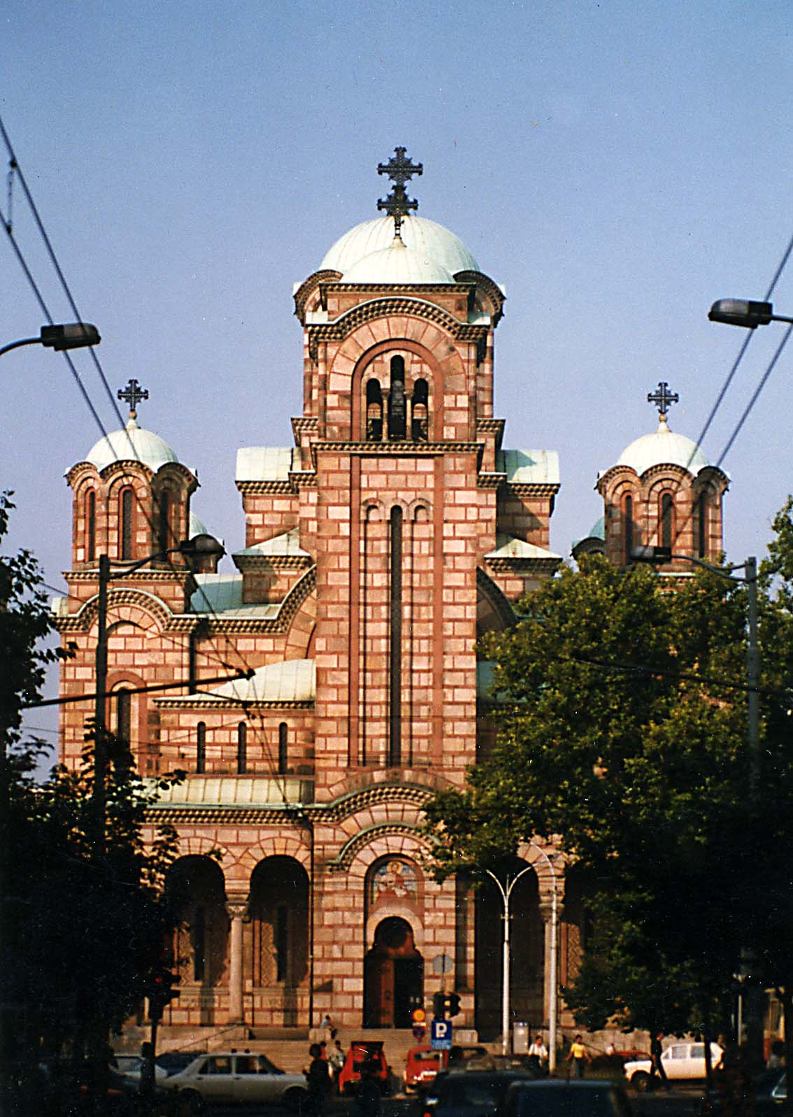 Храм Светог Марка у Београду / Saint Marco church in Belgrade, Serbia